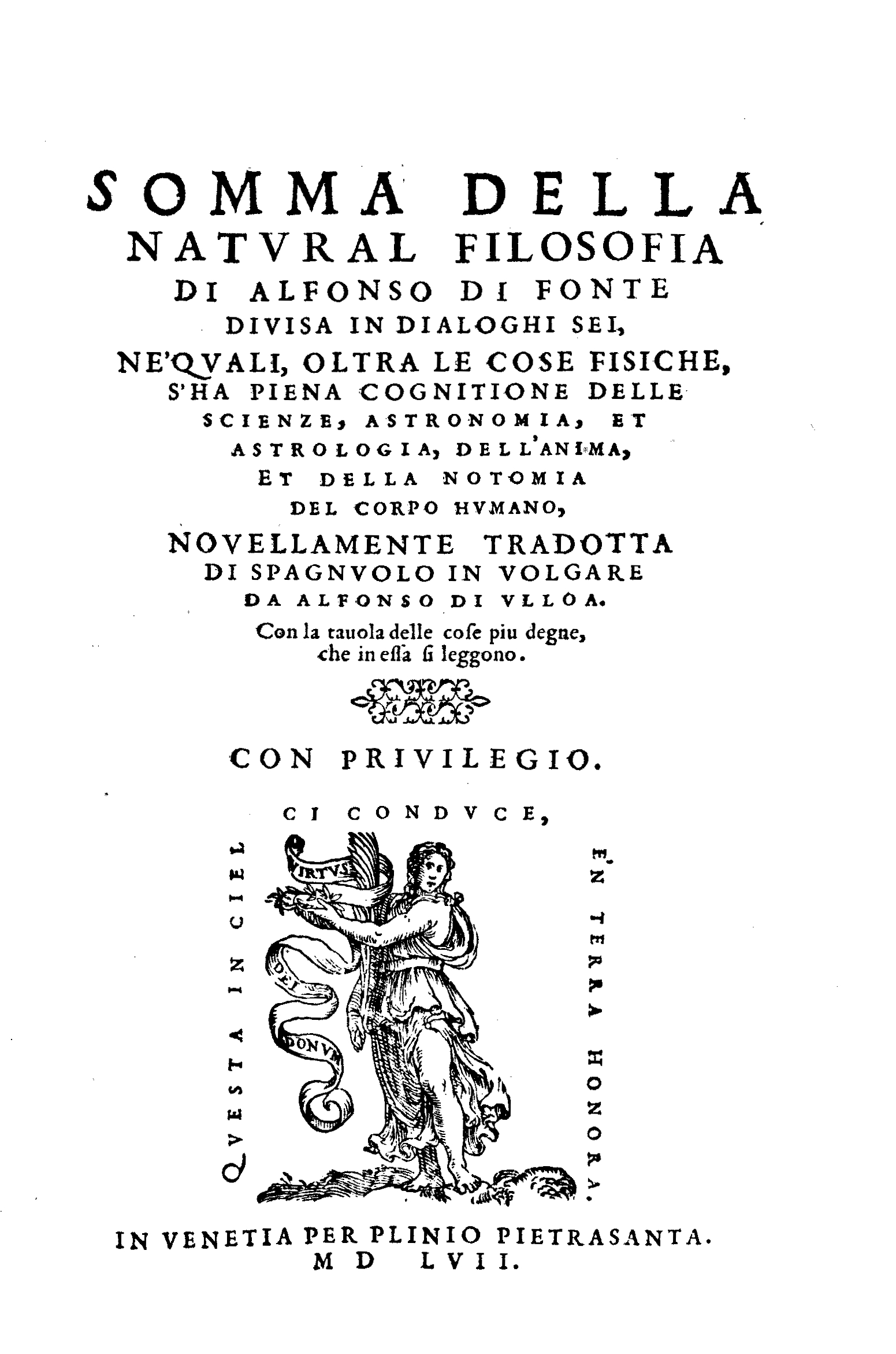 Frontespizio